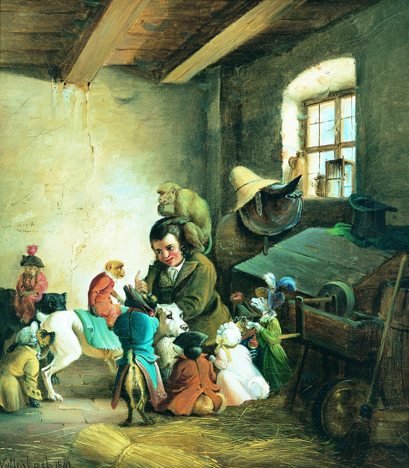 Friedrich Anton Wyttenbach: Die Generalprobe, 1841, Öl auf Leinwand, 39 x 34,5 cm, Stadtmuseum Simeonstift Trier, Inv. Nr. III 1513